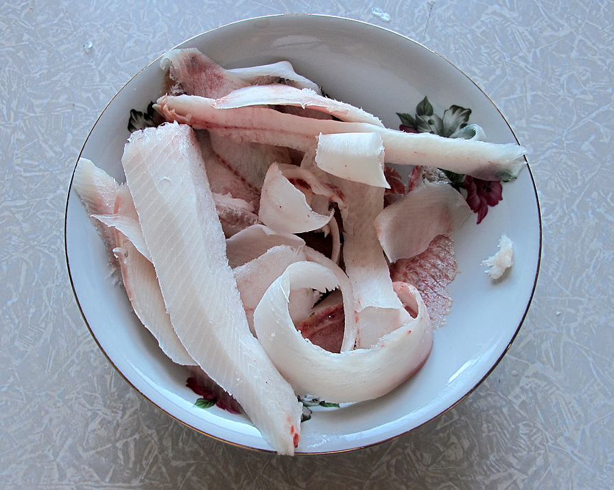 Fiŝrabotaĵo.